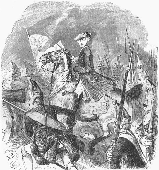 Фридрих II Фридрих II при завоевании Силезии